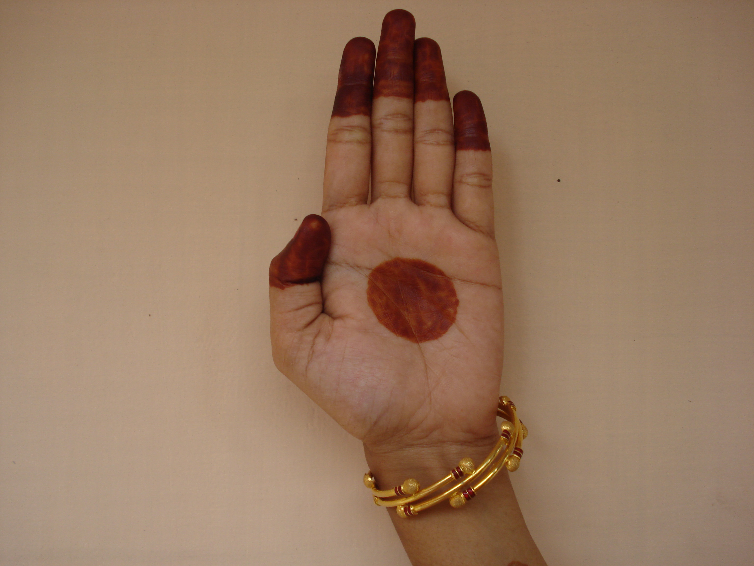 പതാക ഹസ്തം-ഭരതനാട്യം